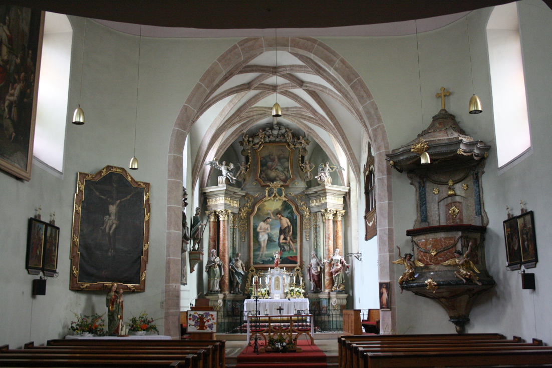 Innenansicht der Pfarrkirche von Altenmarkt an der Triesting.